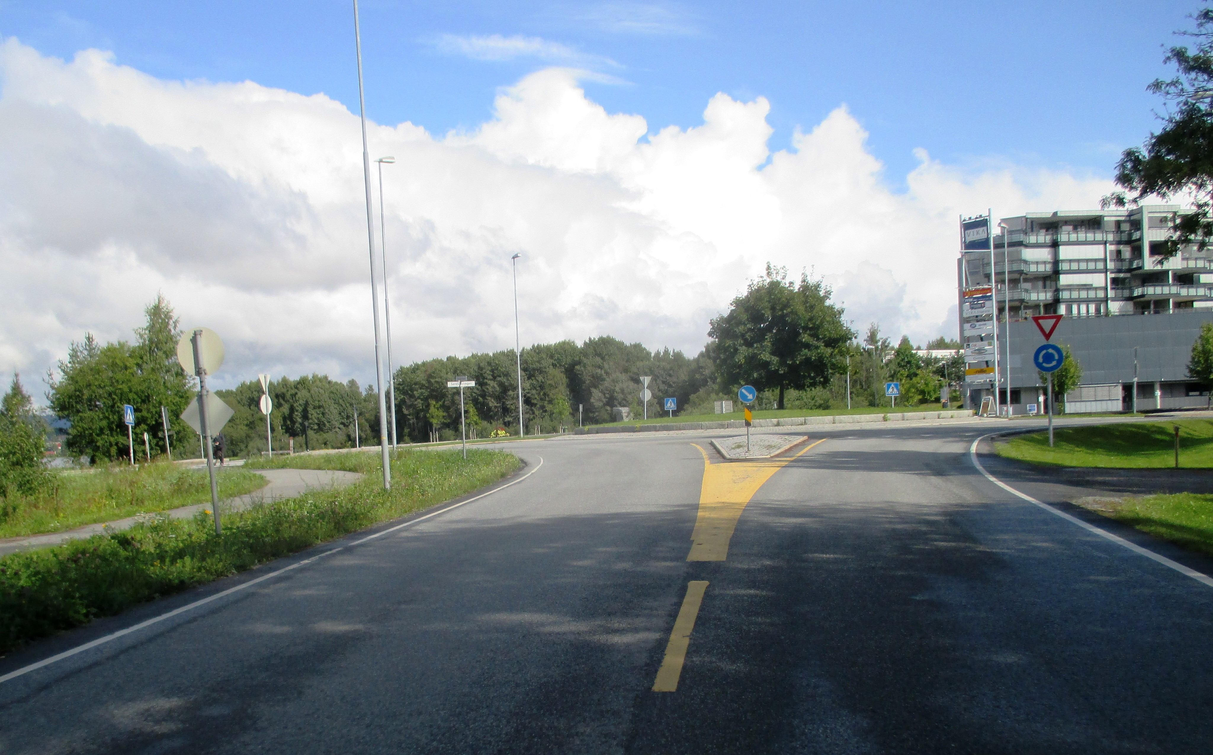 Sandviksvegen (FV1852, tidl. 191) ender i denne rundkjøringen like sør for Stangebrua.